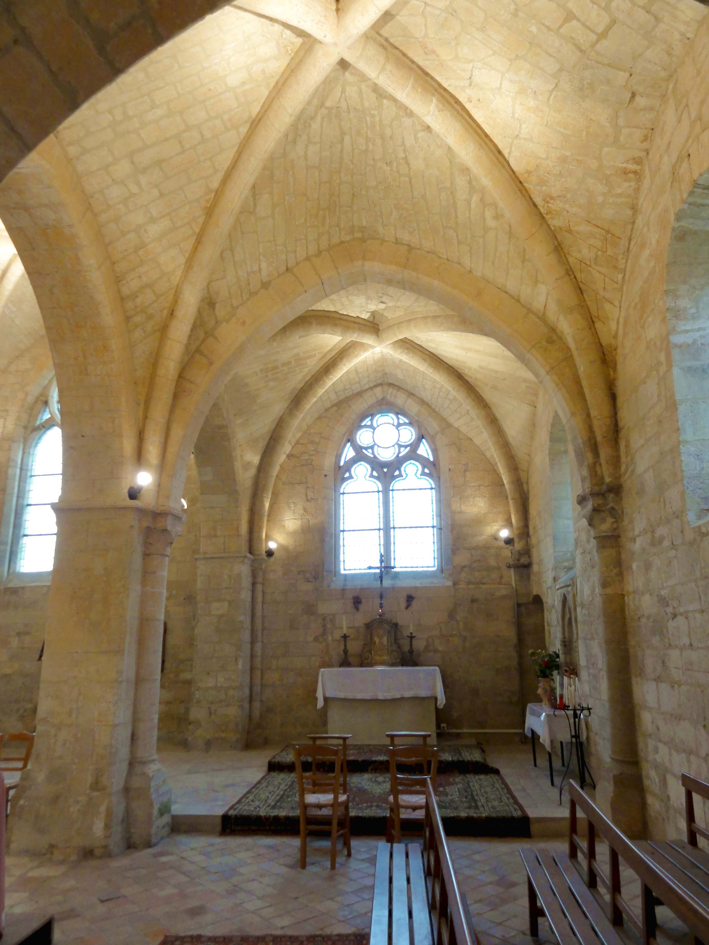 Chapelle sud, vue vers l'est.